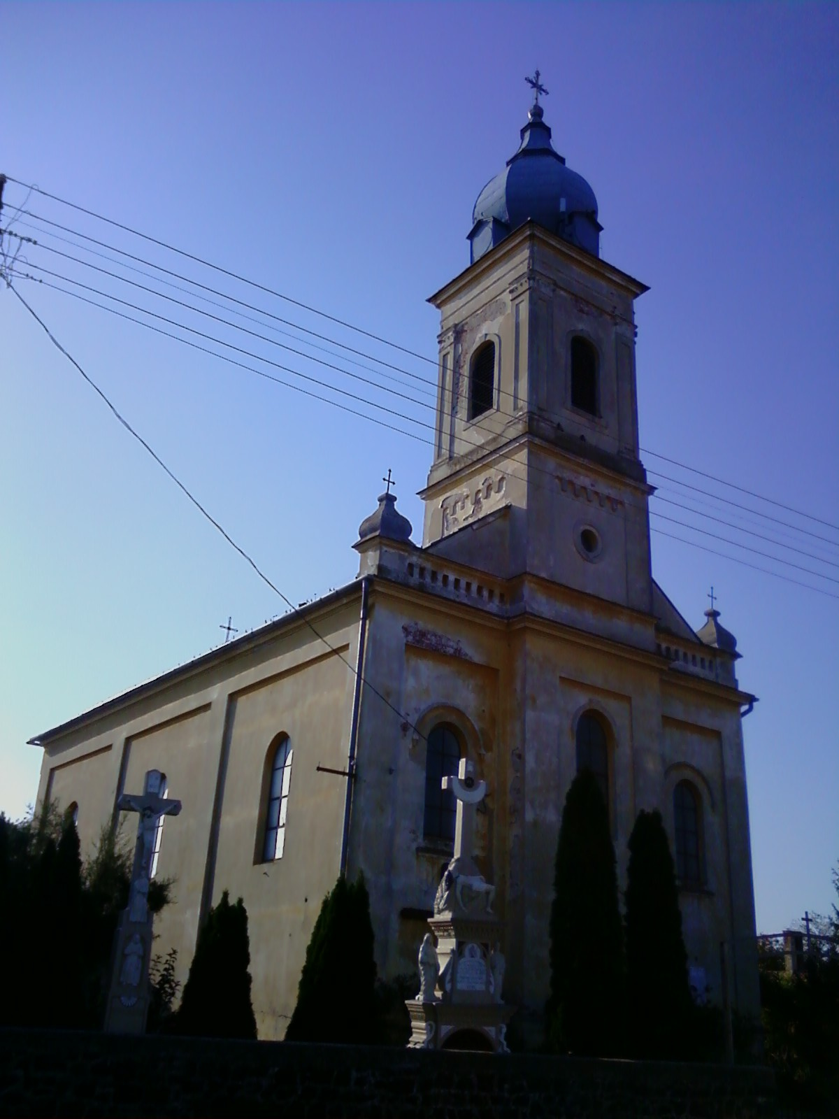 Urunk mennybemenetele római katolikus templom (Somogysámson, Fő utca 104.) This is a photo of a monument in Hungary, Identifier: 17689